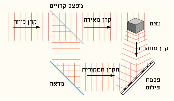 הולוגרפיה תרגום של Holography-record.png מוויקישיתוף.